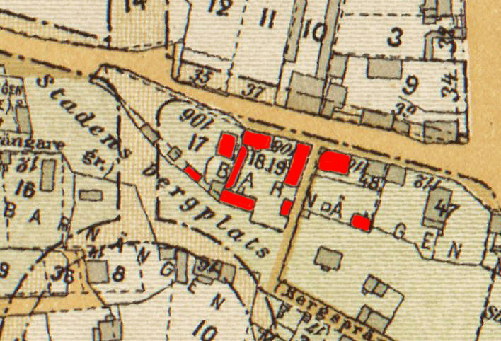 Del av karta över Stockholm visande bebyggelsen vid Skånegatan med bevarade byggnader (röd) i dagens fastighet Mineralet 1.